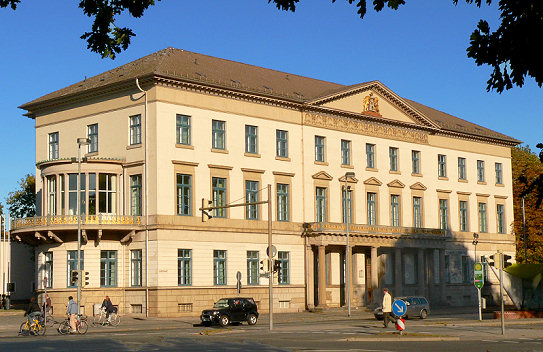 Wangenheim Palais in Hannover Foto aufgenommen von Benutzer Axel Hindemith, Oktober 2005